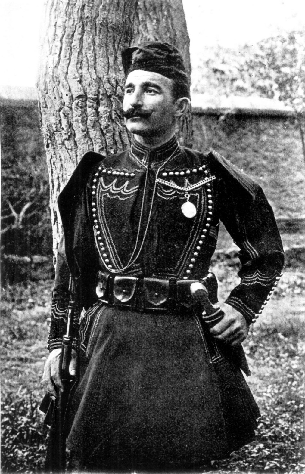 Гръцкият андартски капитан Георгиос Цондос